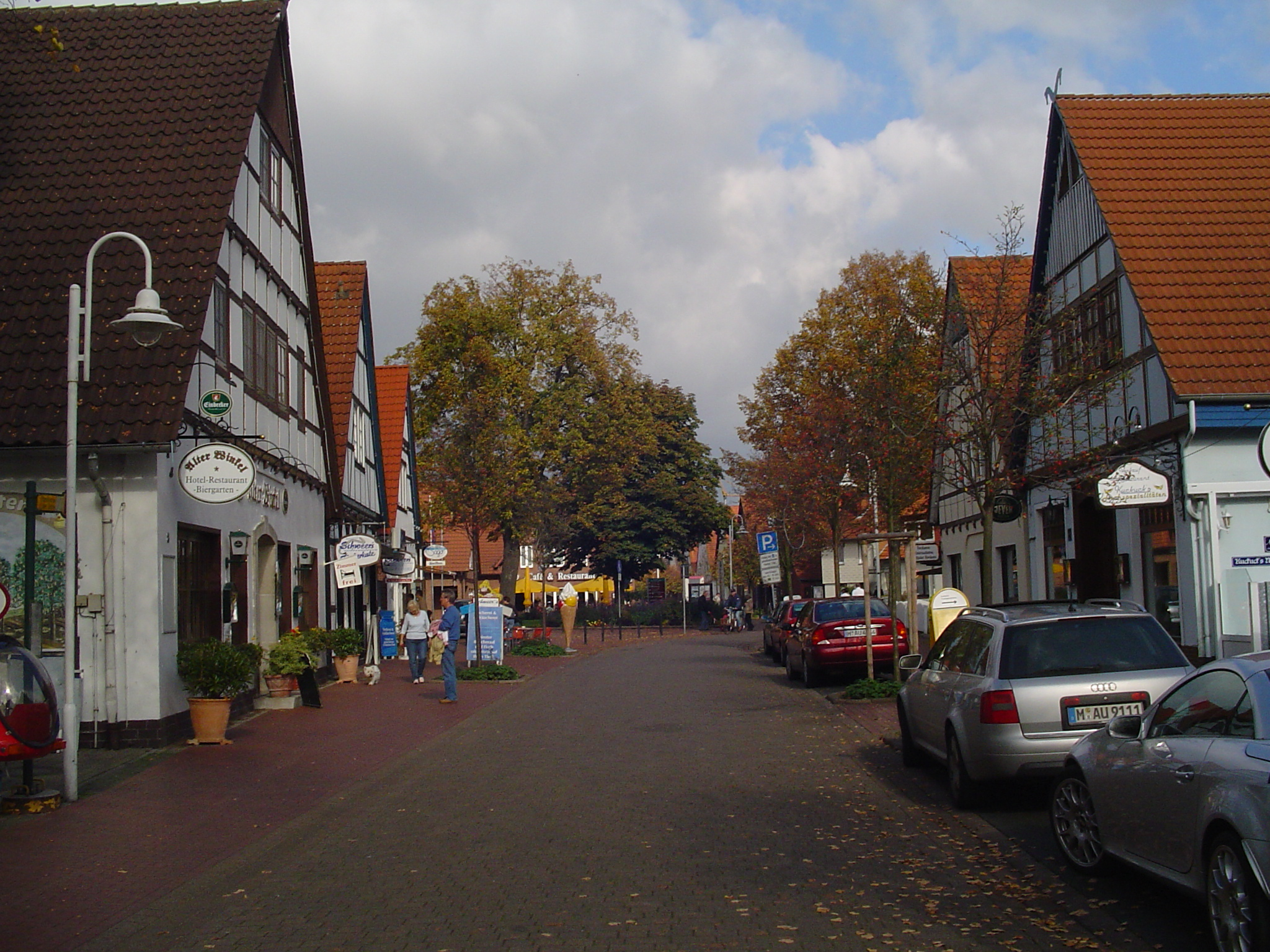 Der "Neue Winkel" in Steinhude, Gasse mit den ältesten Fachwerkhäusern.